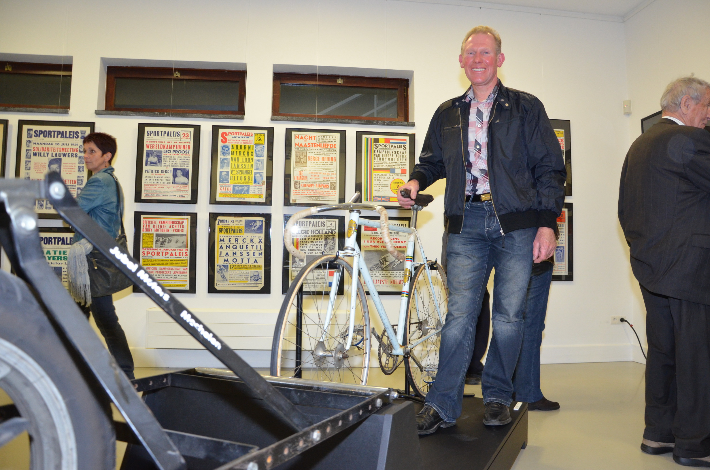 Bij de vernissage van de tentoonstelling 'Sport in het paleis' in het Sportimonium (Zemst-Hofstade) was meervoudig wielerkampioen Etienne De Wilde aanwezig als speciale gast. De tentoonstelling loopt tot 28 februari 2013.